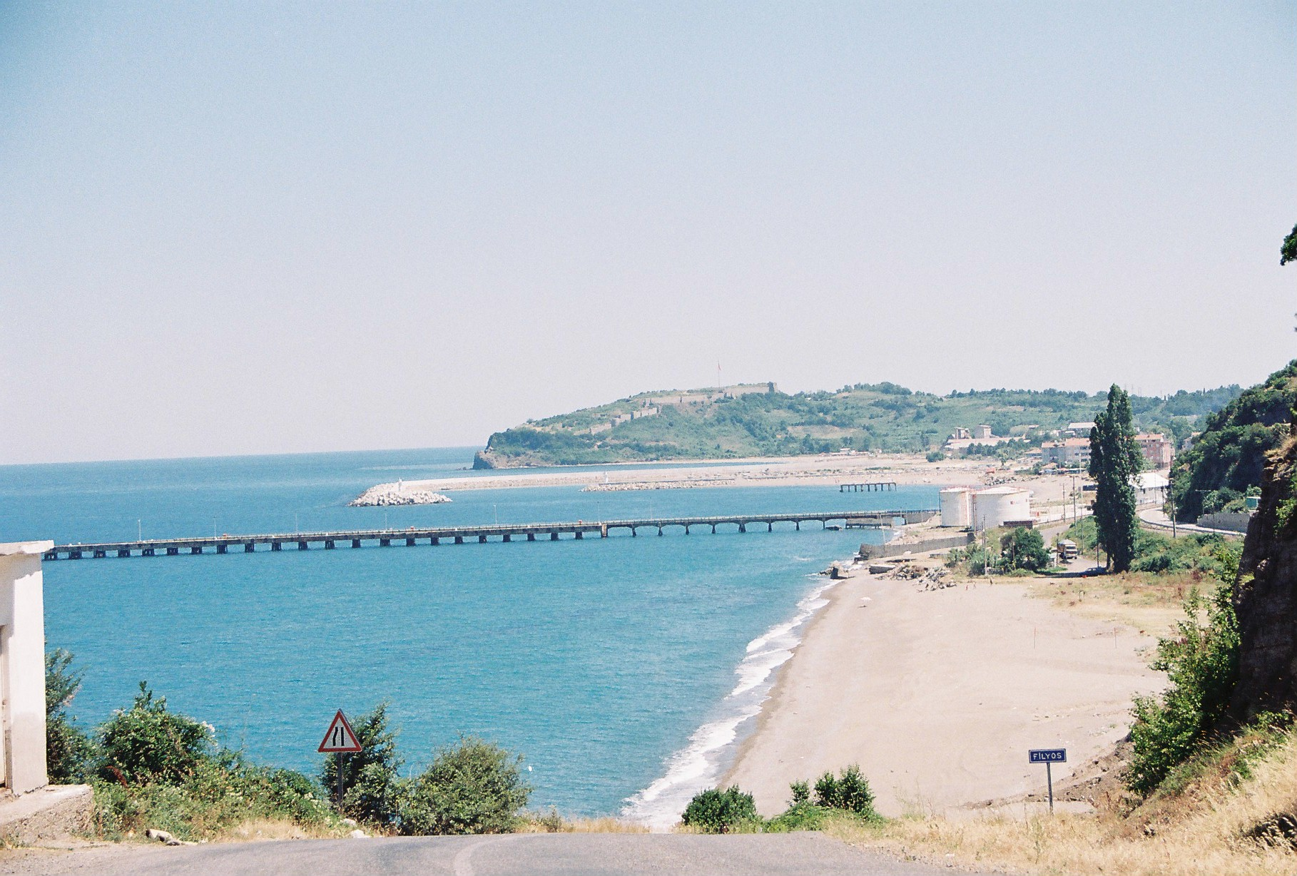 Filyos Bay,Zonguldak,Turkey